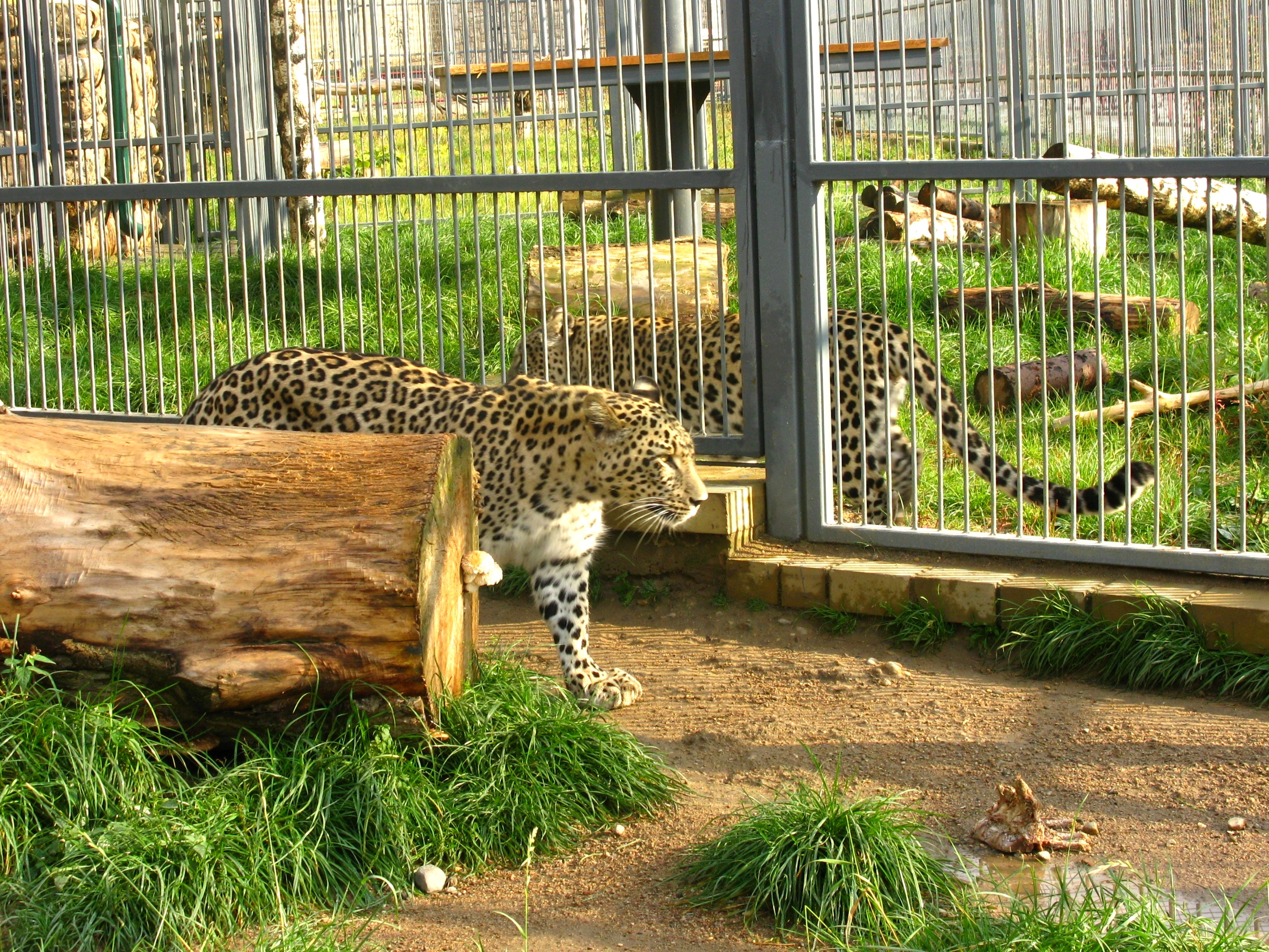 Персидский (переднеазиатский) леопард Жорж (Panthera pardus ciscaucasica) "топчет тропинку" у перегородки, отделяющей его от самки Тайны. Гродненский зоопарк, Беларусь.